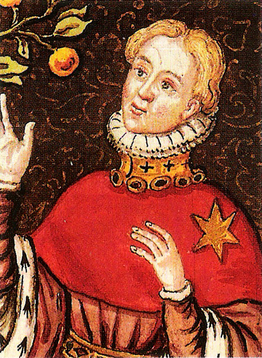 "La Mort menaçant Louis d'Orléans à genoux" (détail), d'après la chapelle des Célestins à Paris, XVIe siècle, Paris, BnF, département Estampes et photographie, fonds François Roger de Gaignières, planche 58, cote RESERVE NA-21 (2)-FOL.